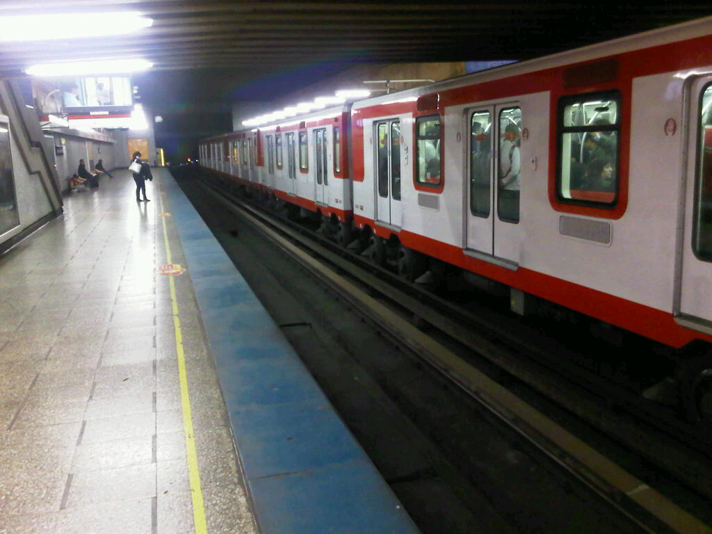 Flickr: Linea 1 del metro de Santiago, Chile. Creo que es la estación Unión Latinoamericana. Uploader: Un NS 07 en la estacion Unión Latinoamericana